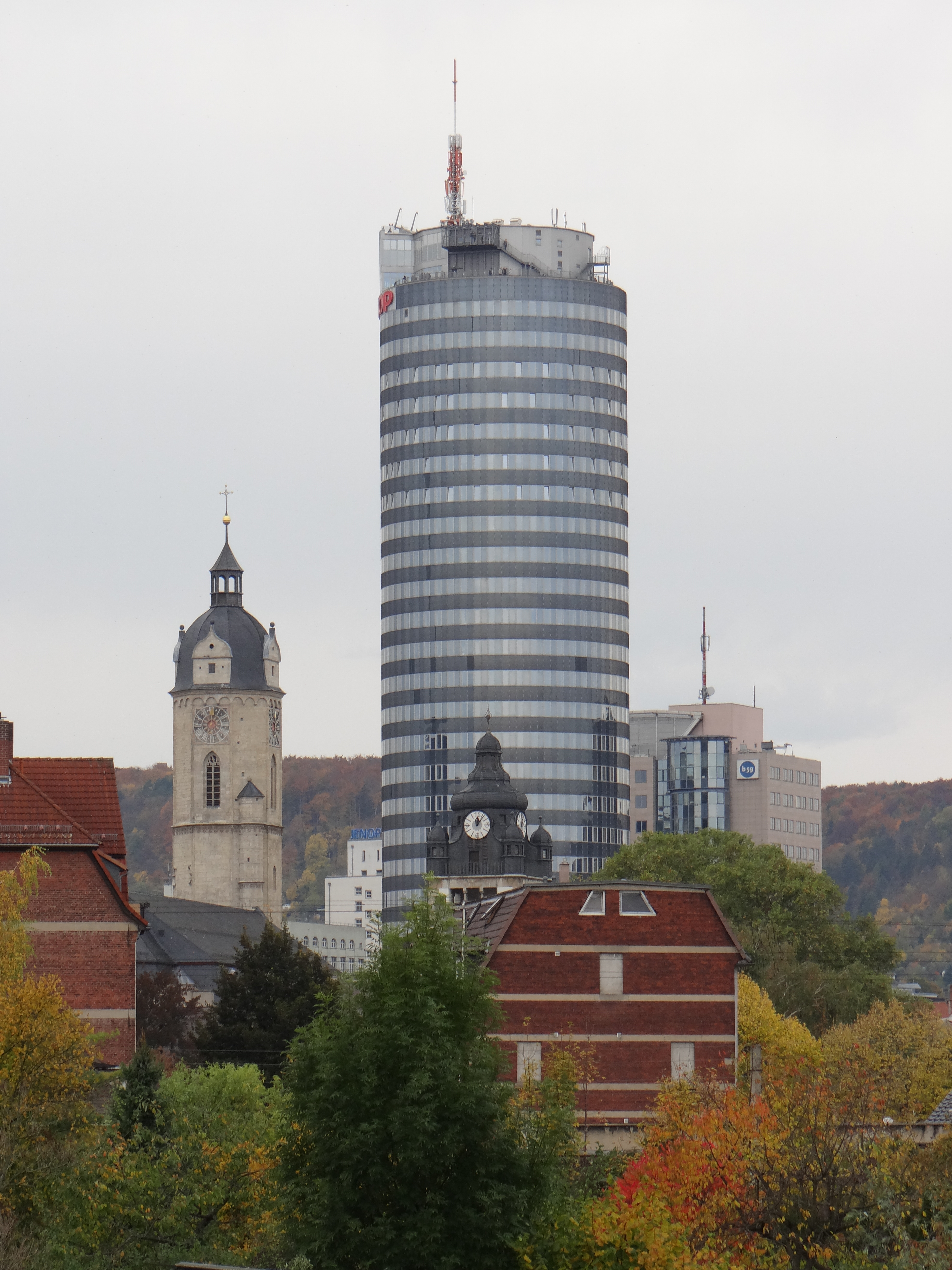 Stadtkirche St. Michael neben dem Jentower, aufgenommen aus Jena-Ost